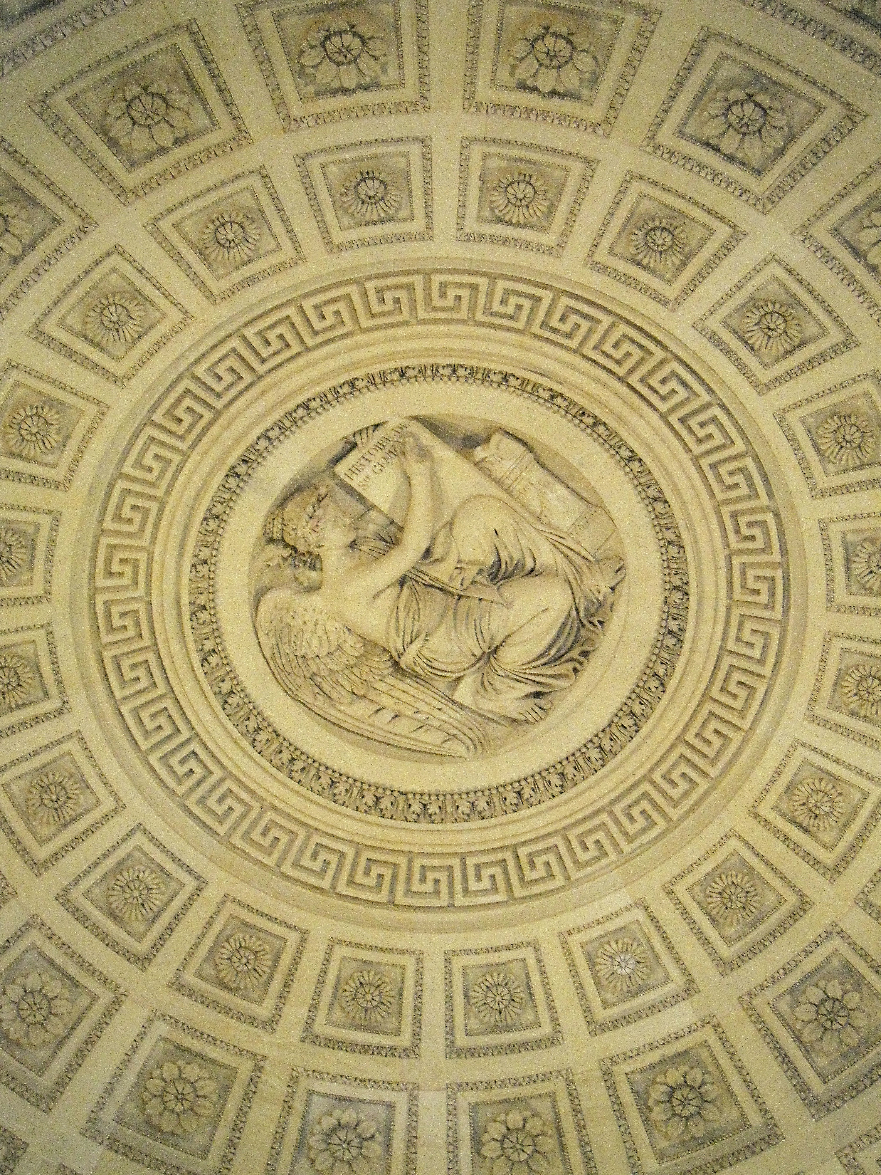 Intérieur d'une coupole du Panthéon de PARIS